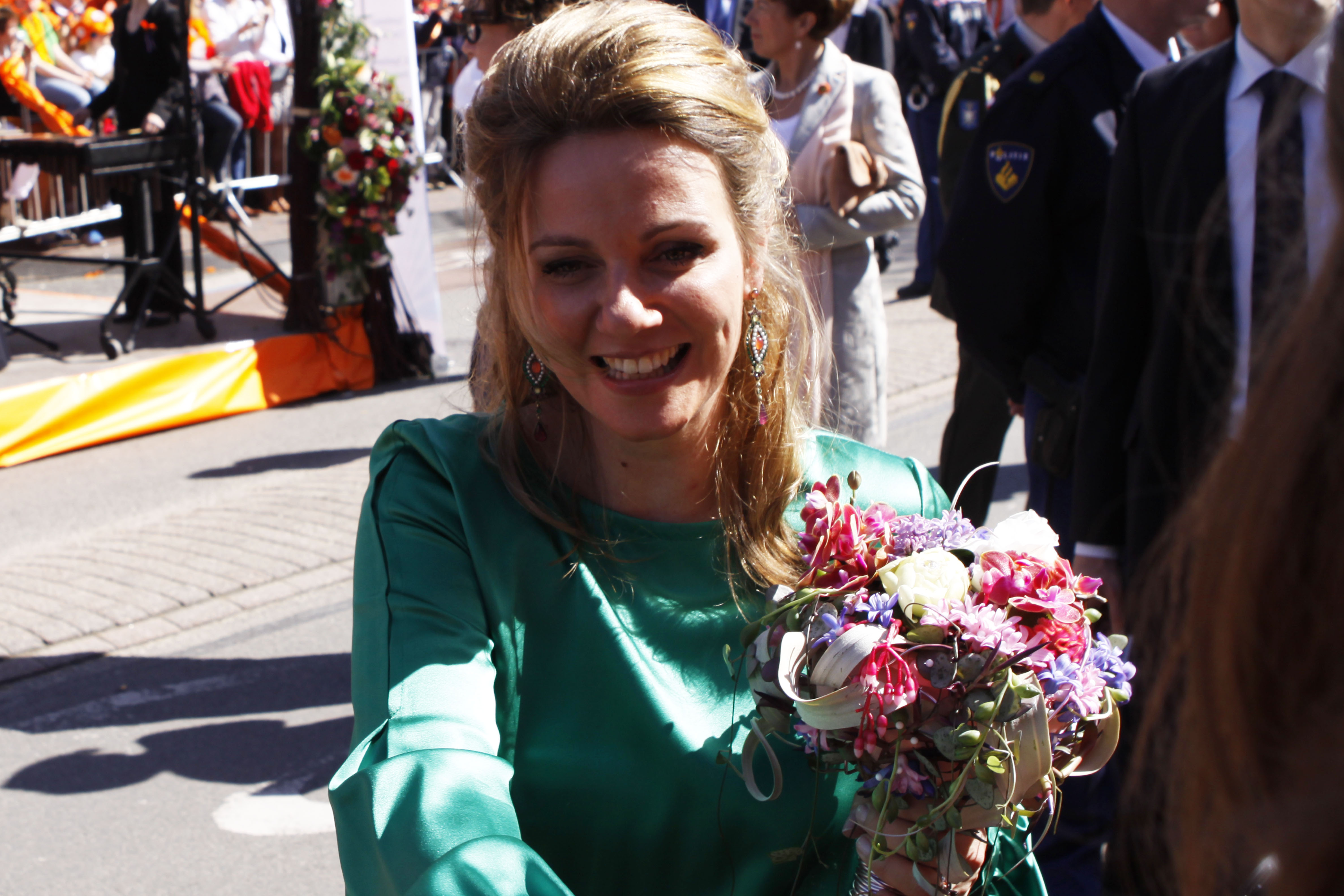 Prinses Annette in Rhenen